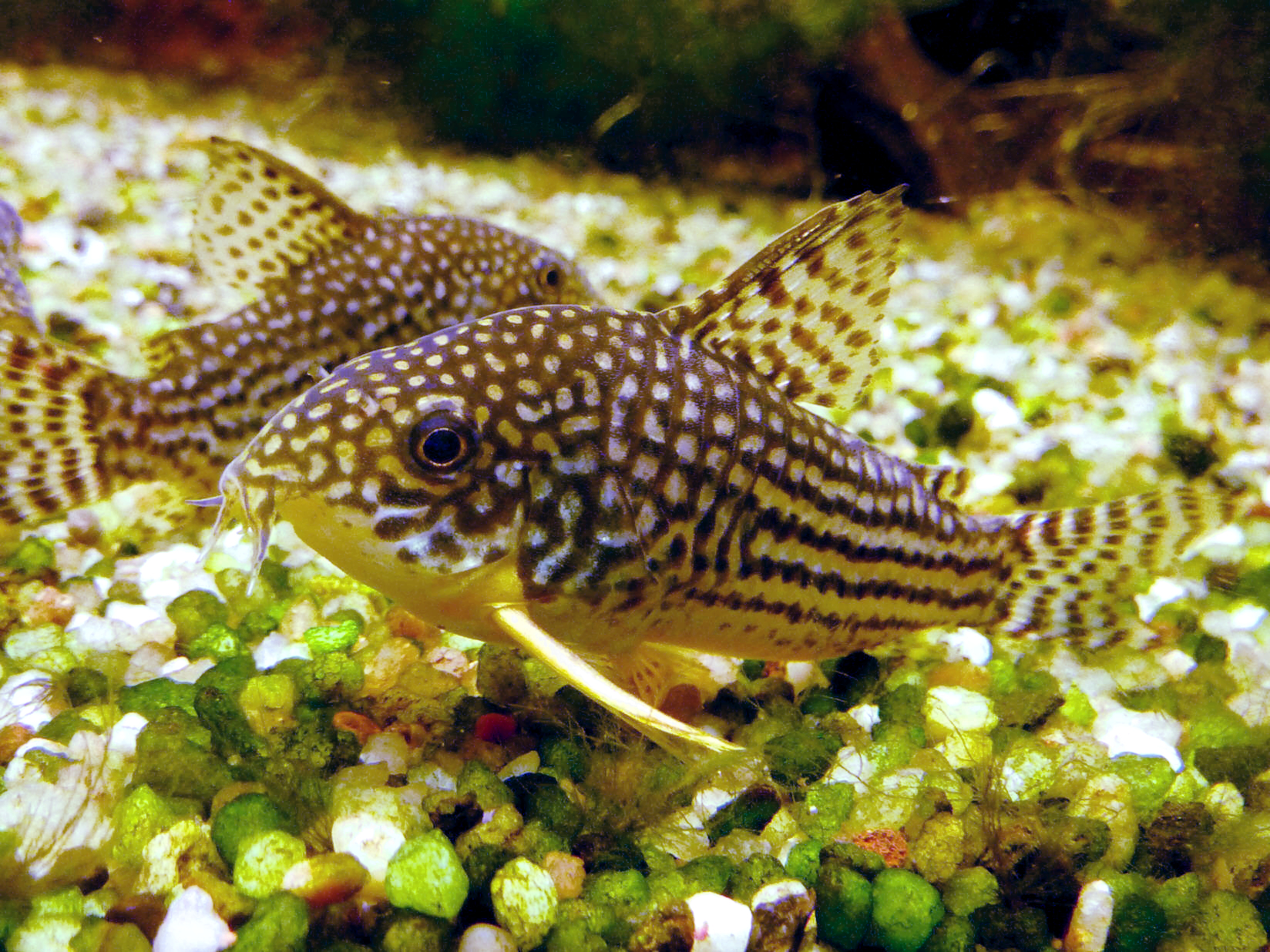 Orangeflossen-Panzerwelse